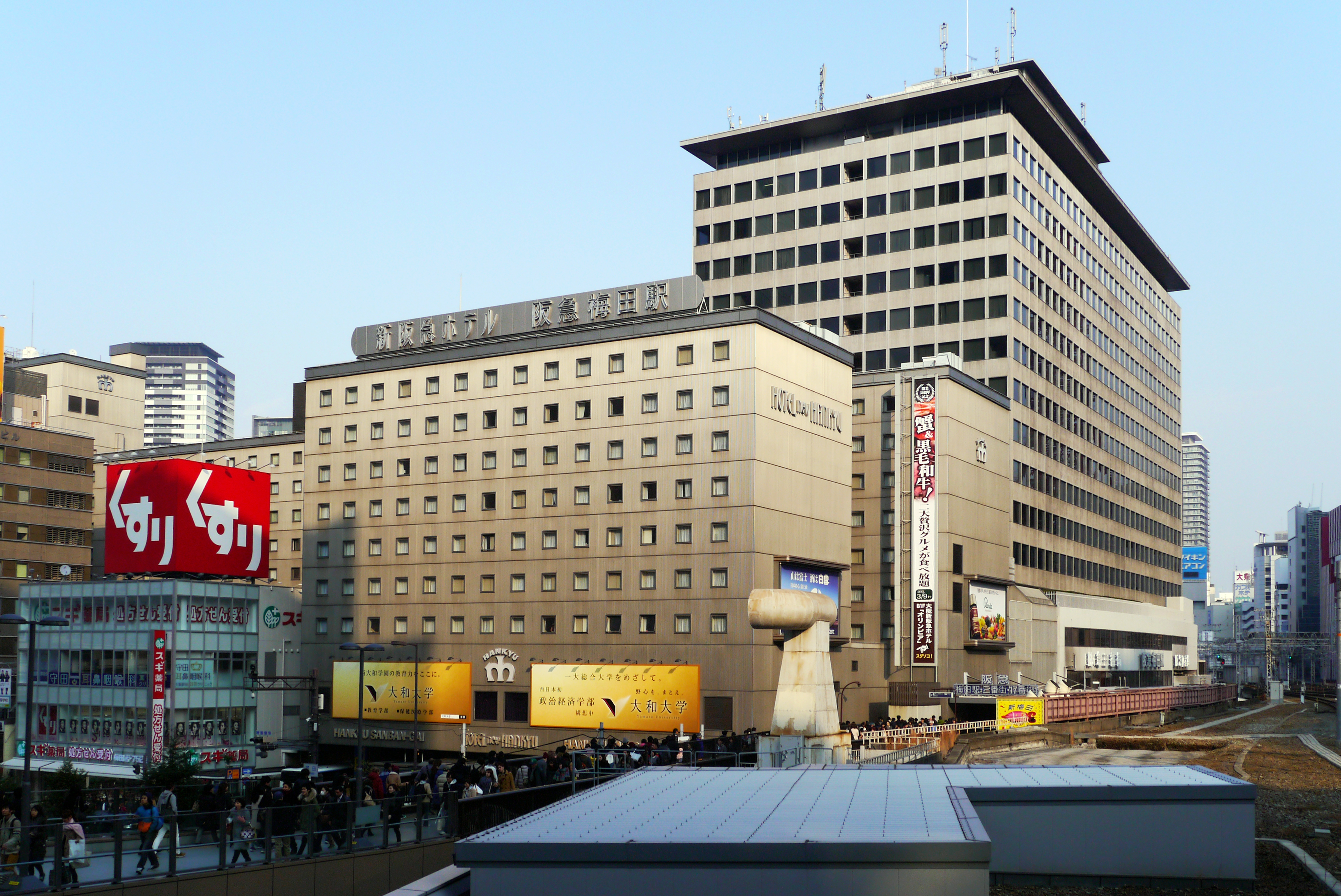 Hotel New Hankyu Osaka (新阪急ホテル大阪), Osaka, Osaka prefecture, Japan